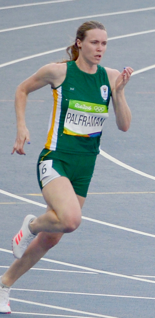 4ème Série du 200m féminin de Rio 2016